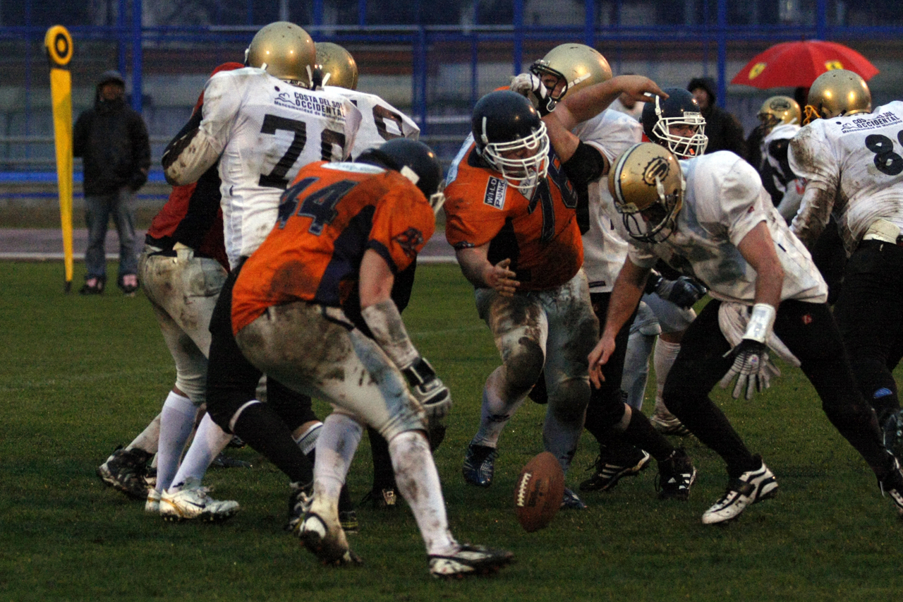 Imagen del equipo de fútbol americano Marbella Suns